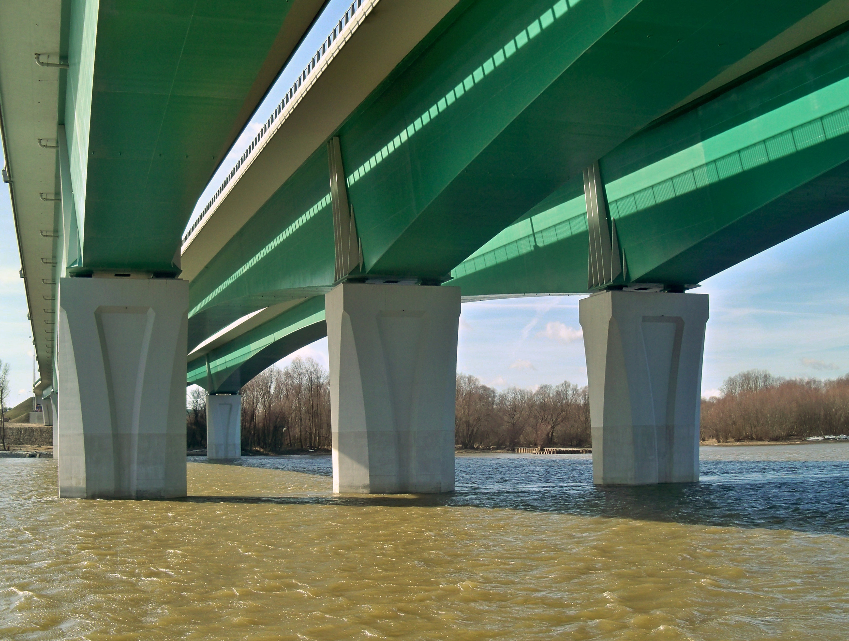 Most Marii Skłodowskiej-Curie w Warszawie, zwany też Północnym